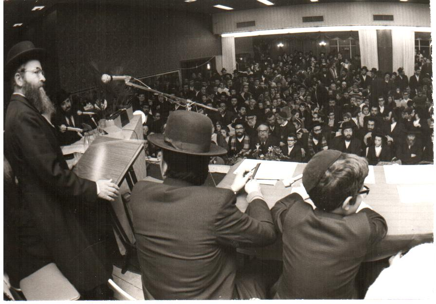 ראש ישיבת באר יעקב הרב משה שמואל שפירא נואם בטקס חתן המשנה של המבחנים הארציים לנוער במשנה של הרב שלמה שטנצל מארגון קביעותא